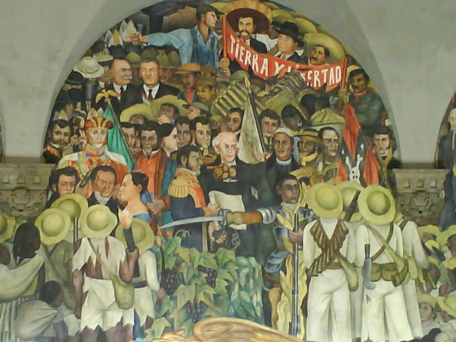 Sector del mural en la escalinata de Palacio Nacional referente a la lucha de Independencia